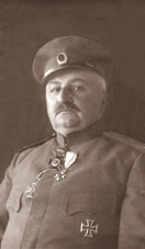 Ген. Пантелей Киселов, военен герой, освободил Южна Добруджа през втората Балканска война